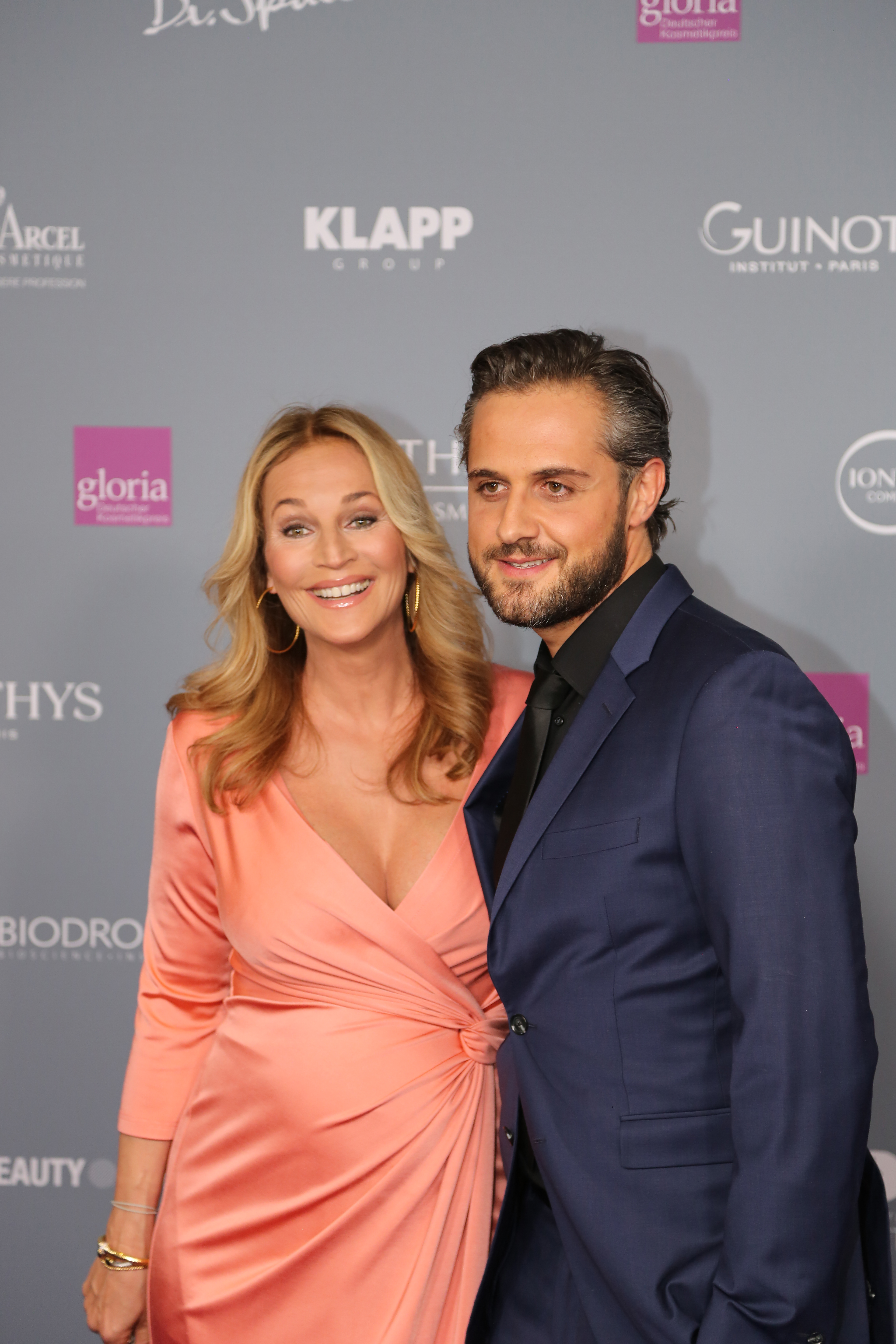 Caroline Beil mit Philipp Sattler beim "Gloria – Deutscher Kosmetikpreis" am 31. März 2017 im Hilton Hotel Düsseldorf.